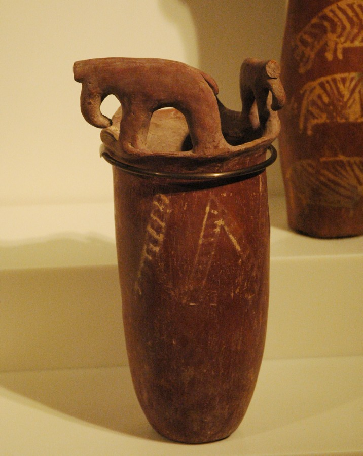 Gefäss mit auf dem Rand aufgesetzten Elefantenfiguren, Altes Ägypten, Naqada II, 3700-3200 v. Chr., el-Chozam (?), Keramik, ÄM 22388